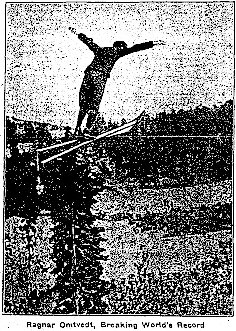 Ragnar Omtvedt lors de son record du monde en 1916 sur le Howelsen Hill.